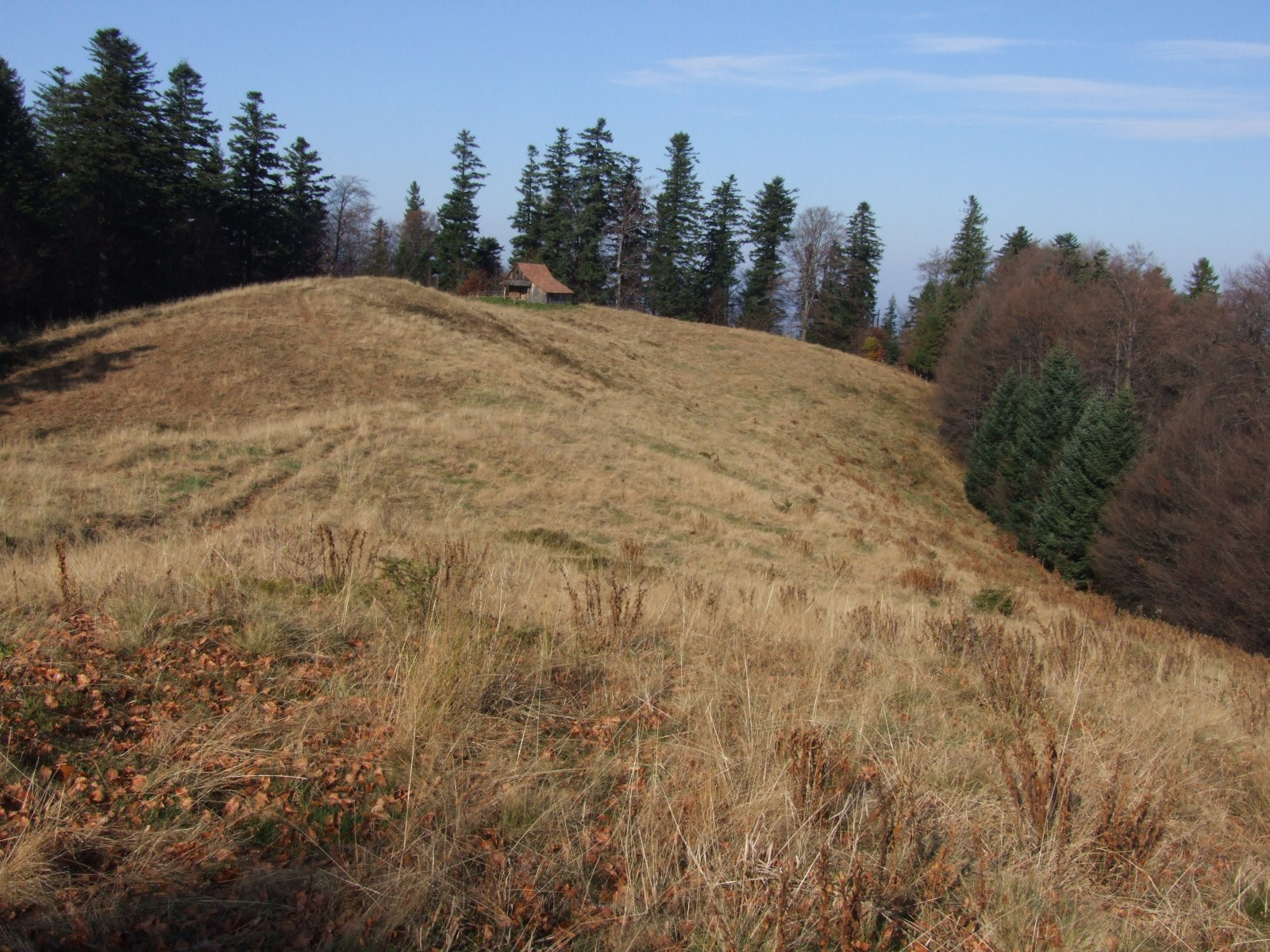 Polana Cerla Hanulowa w Gorcach